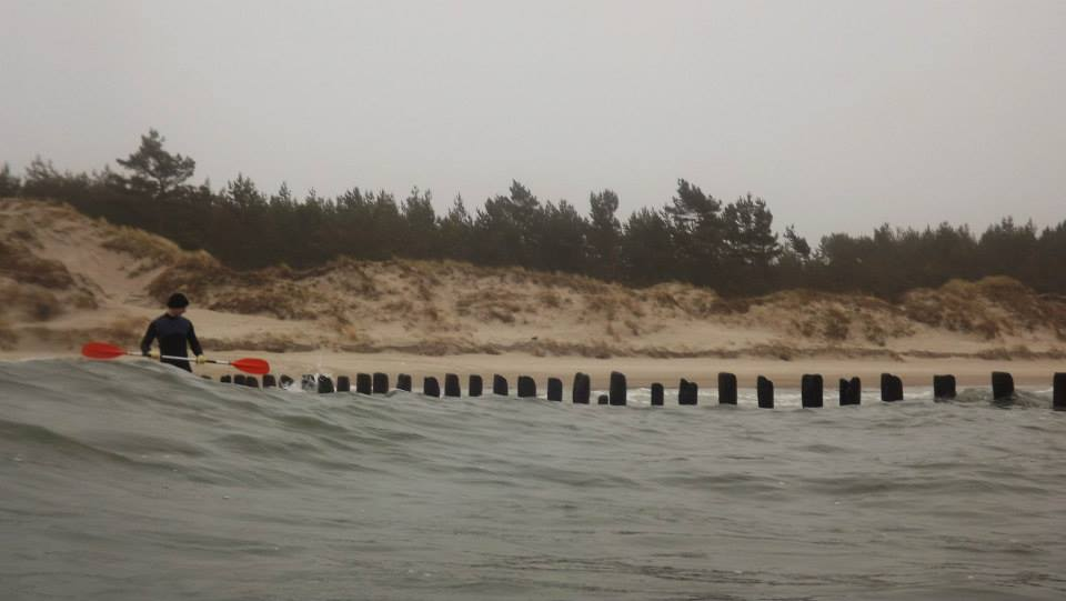 Longe Cōte